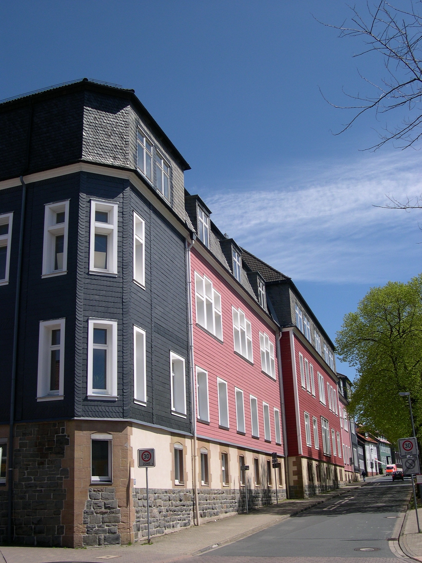 Blick auf das Hauptgebäude der TU Clausthal, Teilansicht der Südseite